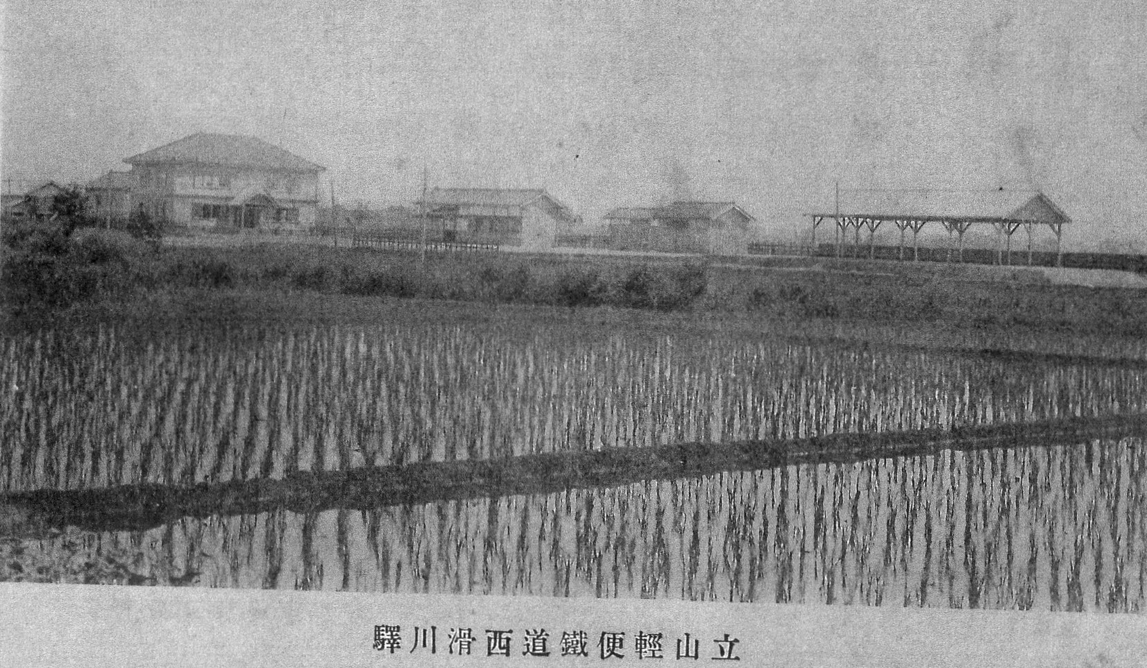 立山軽便鉄道時代の西滑川駅の様子。立山軽便鉄道本社社屋が隣接していた。